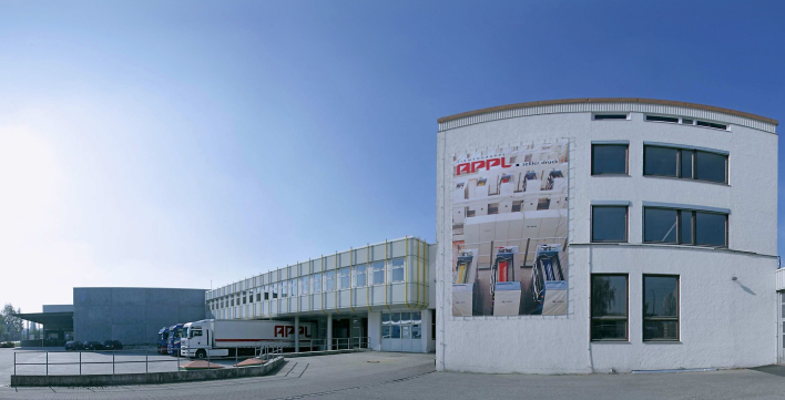 sellier druck GmbH in Freising